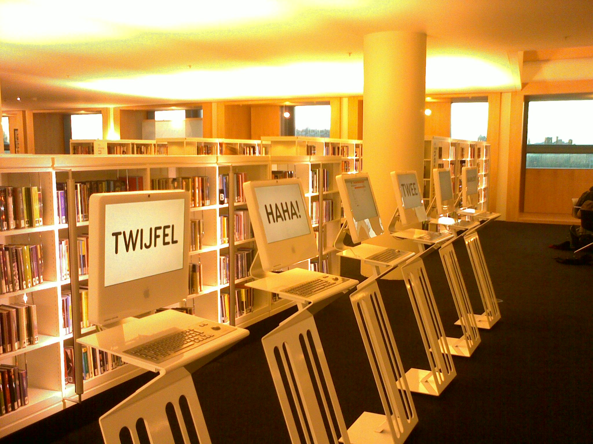 Interieur Bibliotheek, met computers en boeken. In Amsterdam.